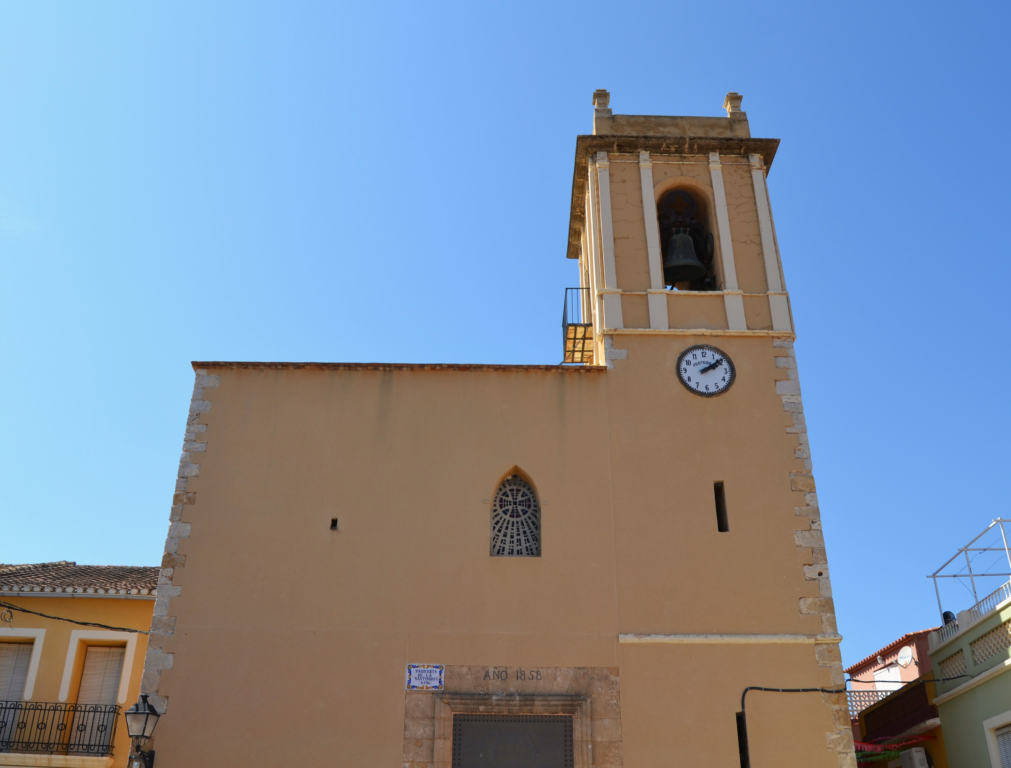 Església de la Santíssima Sang de Benidoleig. 30.030-002.